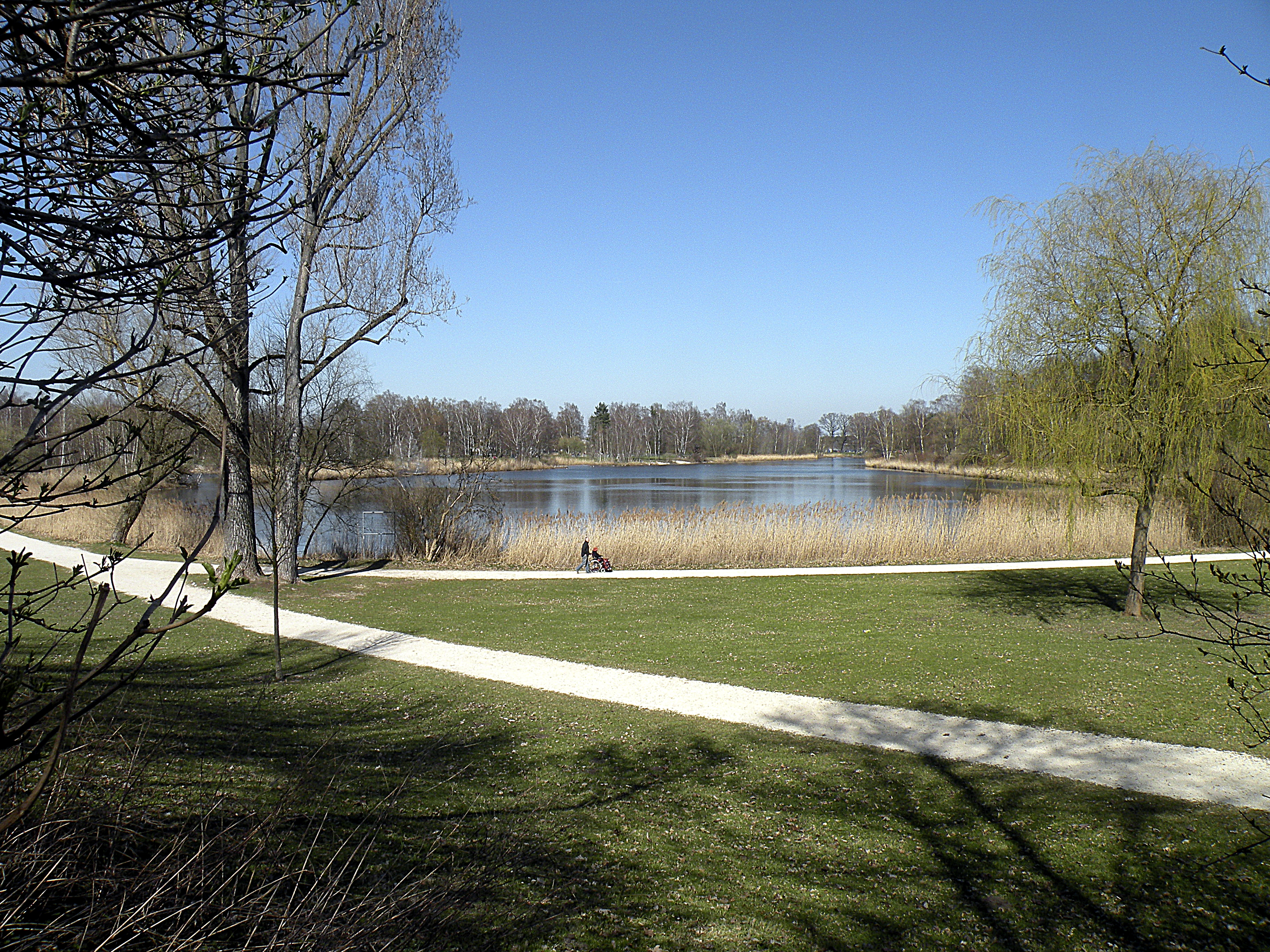 Зильберзее